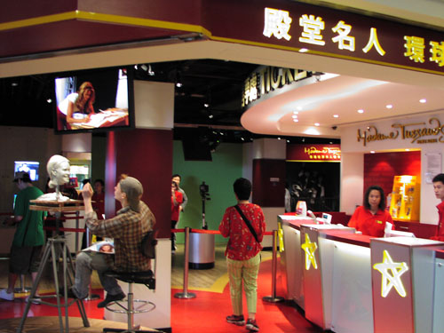 A＝凌霄閣(2006.7)